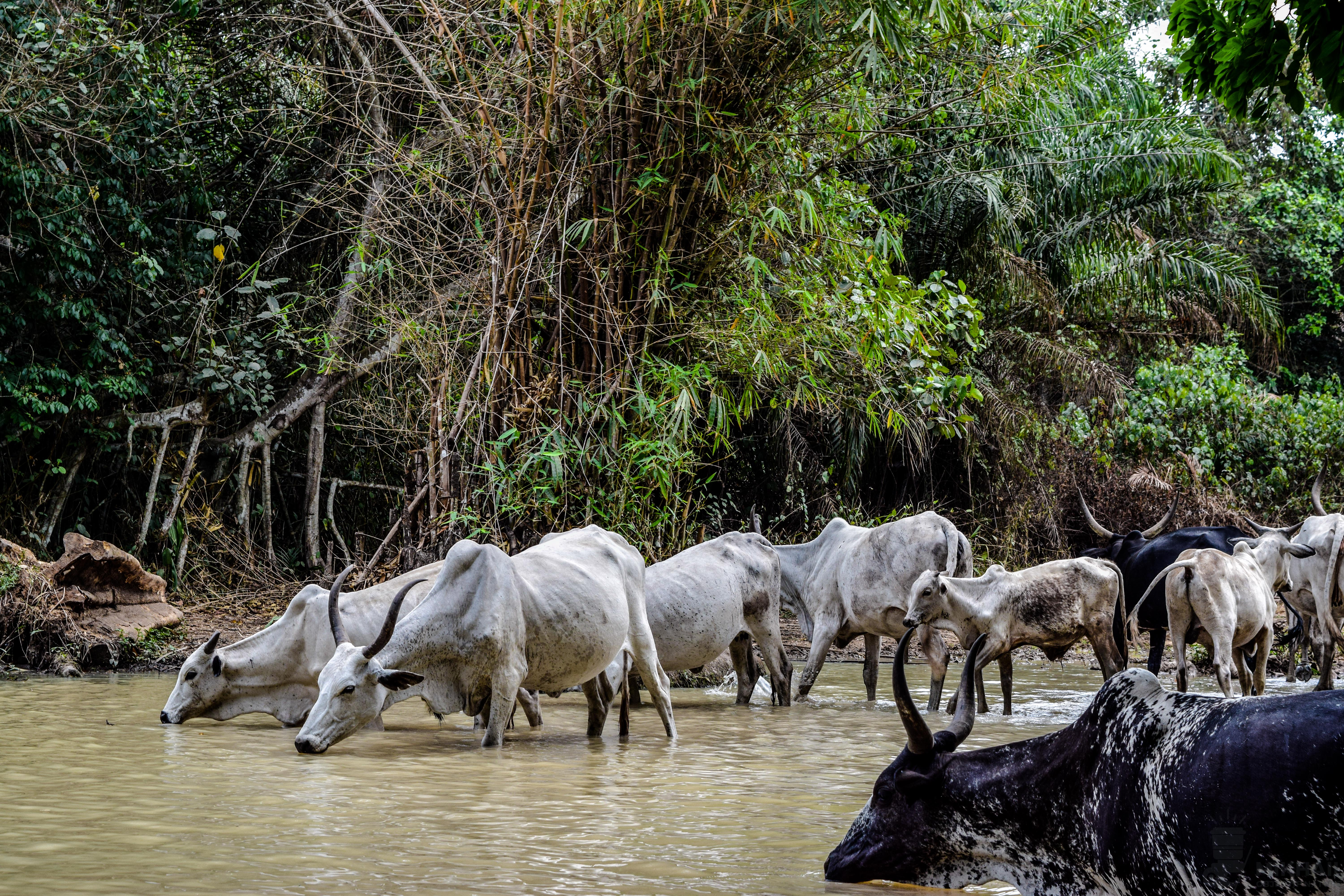 Abreuvage de troupeau de bovins en transhumance dans la forêt de Lokoli